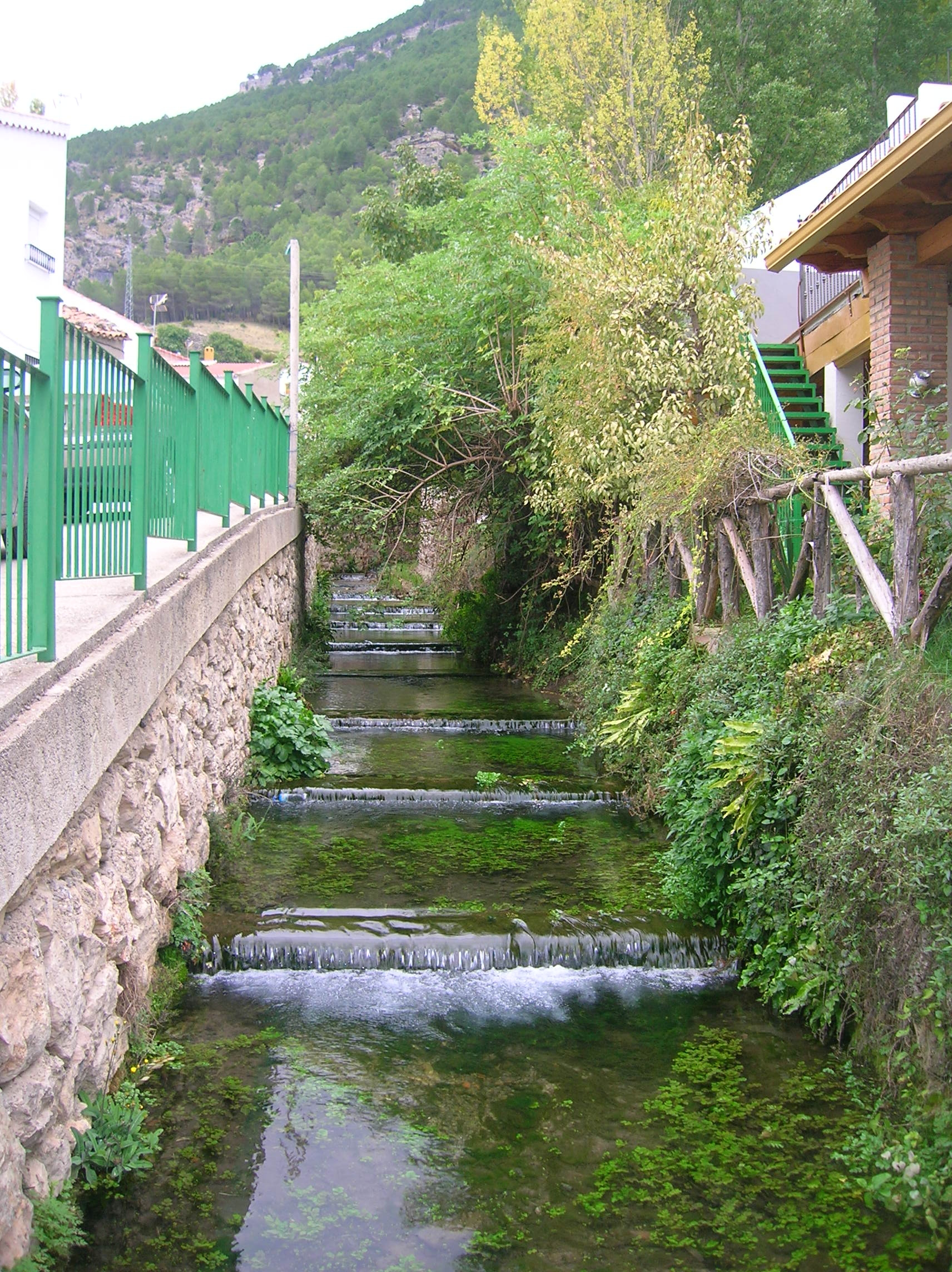 Torrente de La Toba a su paso por el nucleo urbano, decenciendo desde el nacimiento de la Cueva del Agua